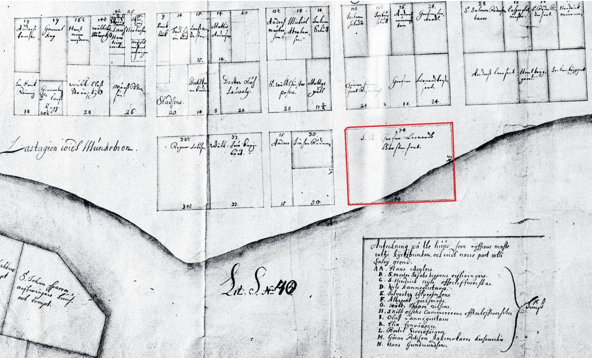 Stadsplanering sydvästra Stadsholmen med kvarteret Daedalus 1651